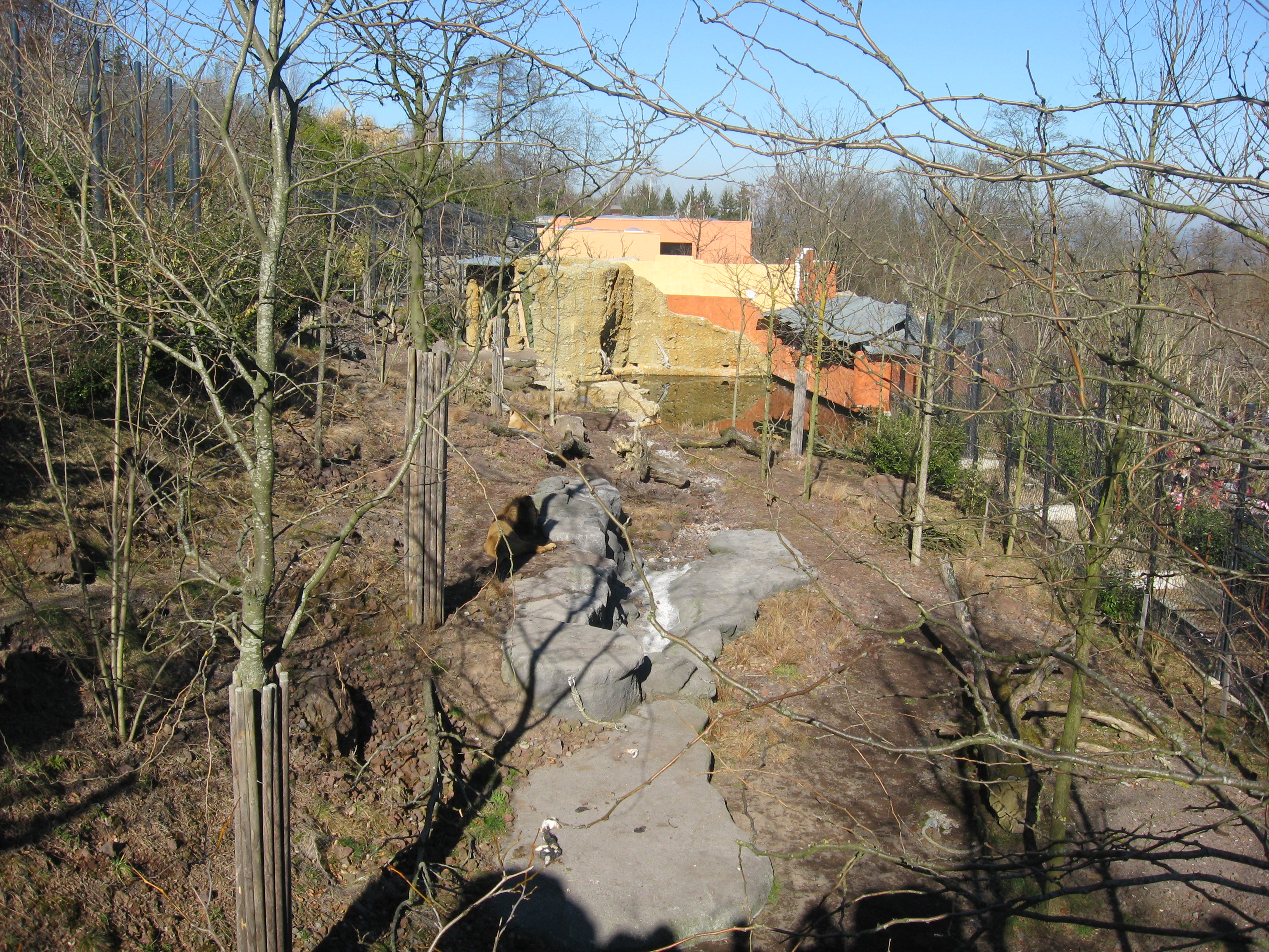 Löwenanlage des Zürcher Zoos